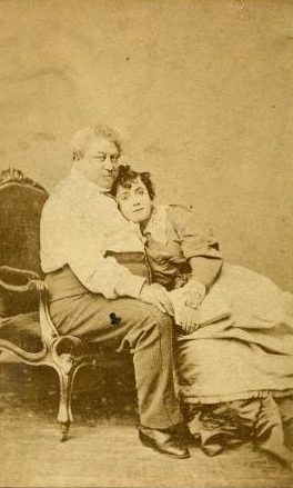 Alphonse Liébert.- Alexandre Dumas père et Ada Menken assis, à Paris, vers 1867, Tirage photographique conservé au musée Alexandre Dumas deVillers-Cotterêts. Joconde Portail des collections des musées de France.